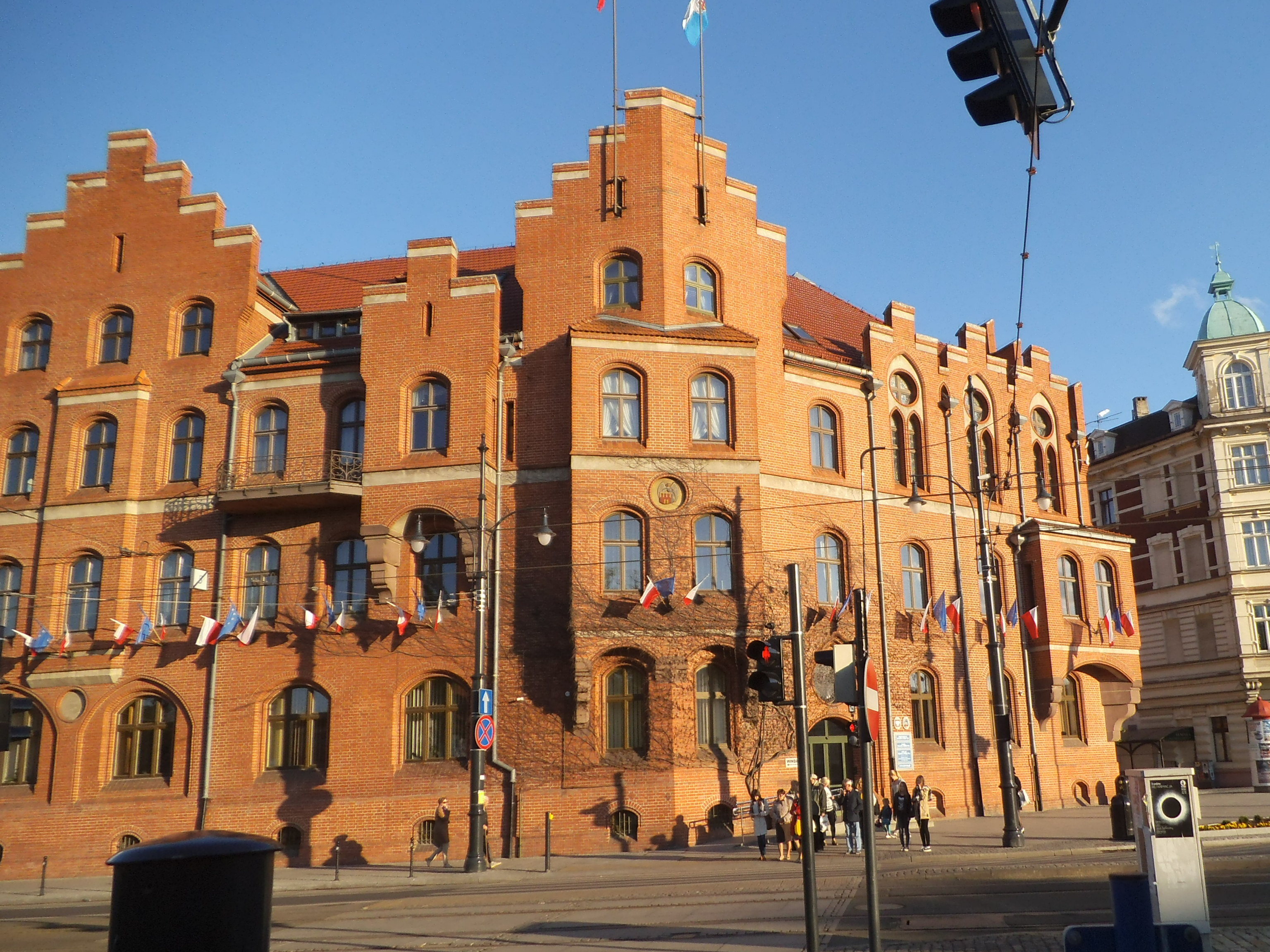 UM w Toruniu